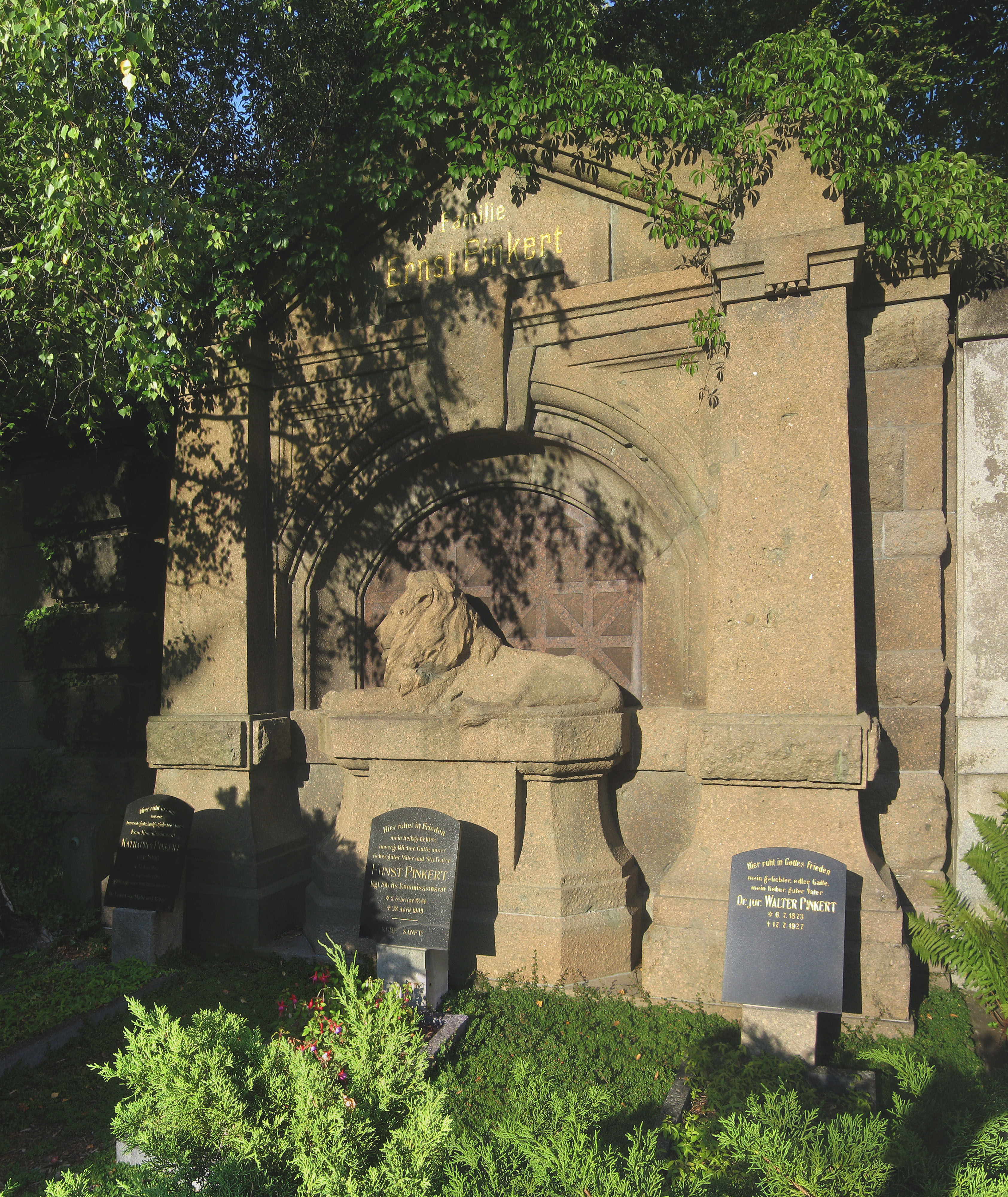 Grabstätte von Ernst Pinkert (1844–1909) auf dem Nordfriedhof in Leipzig (Wandstelle, I. Abt.)